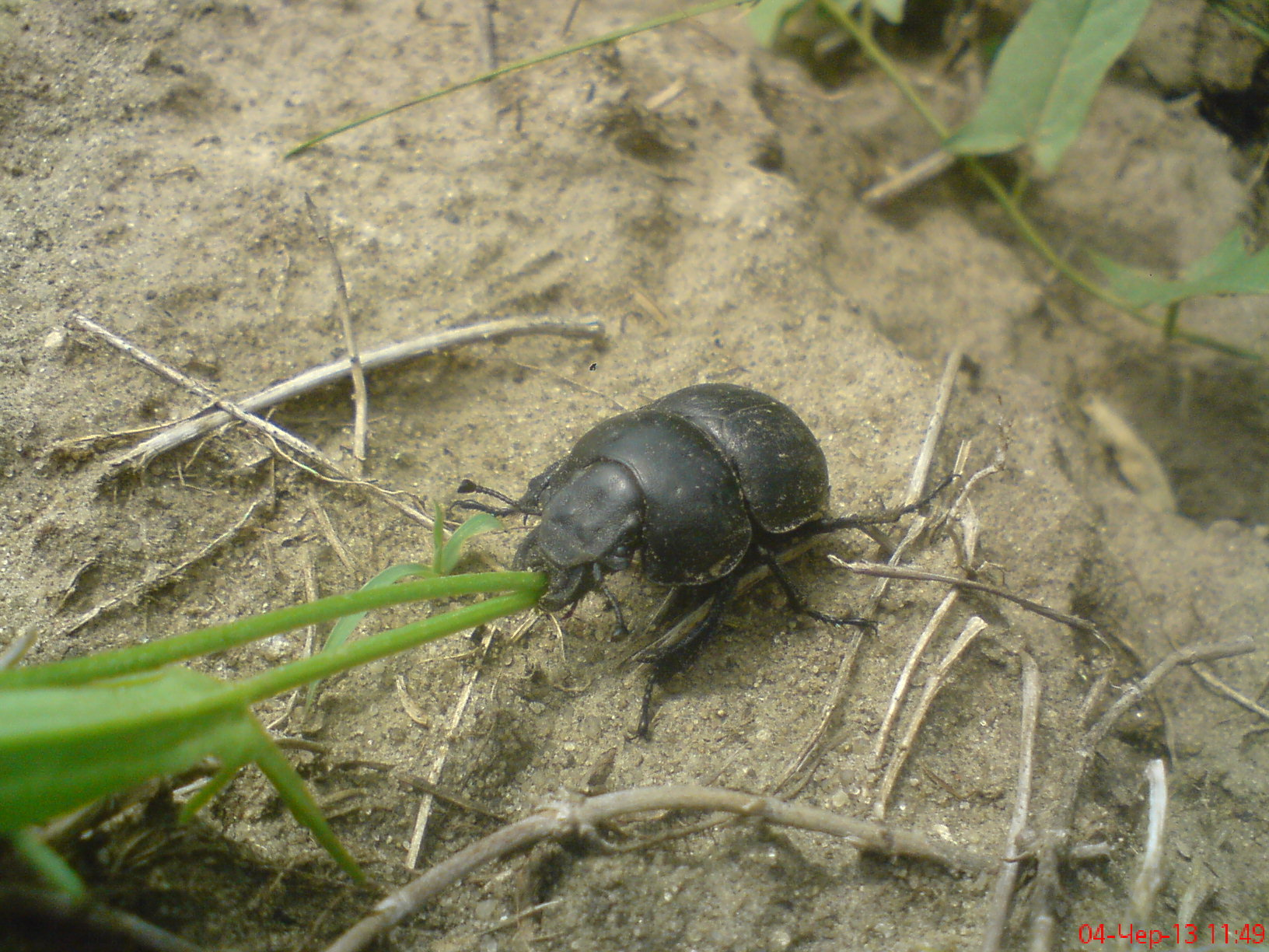 «Тулинецькі Переліски», Миронівський район, Тулинецька сільська рада